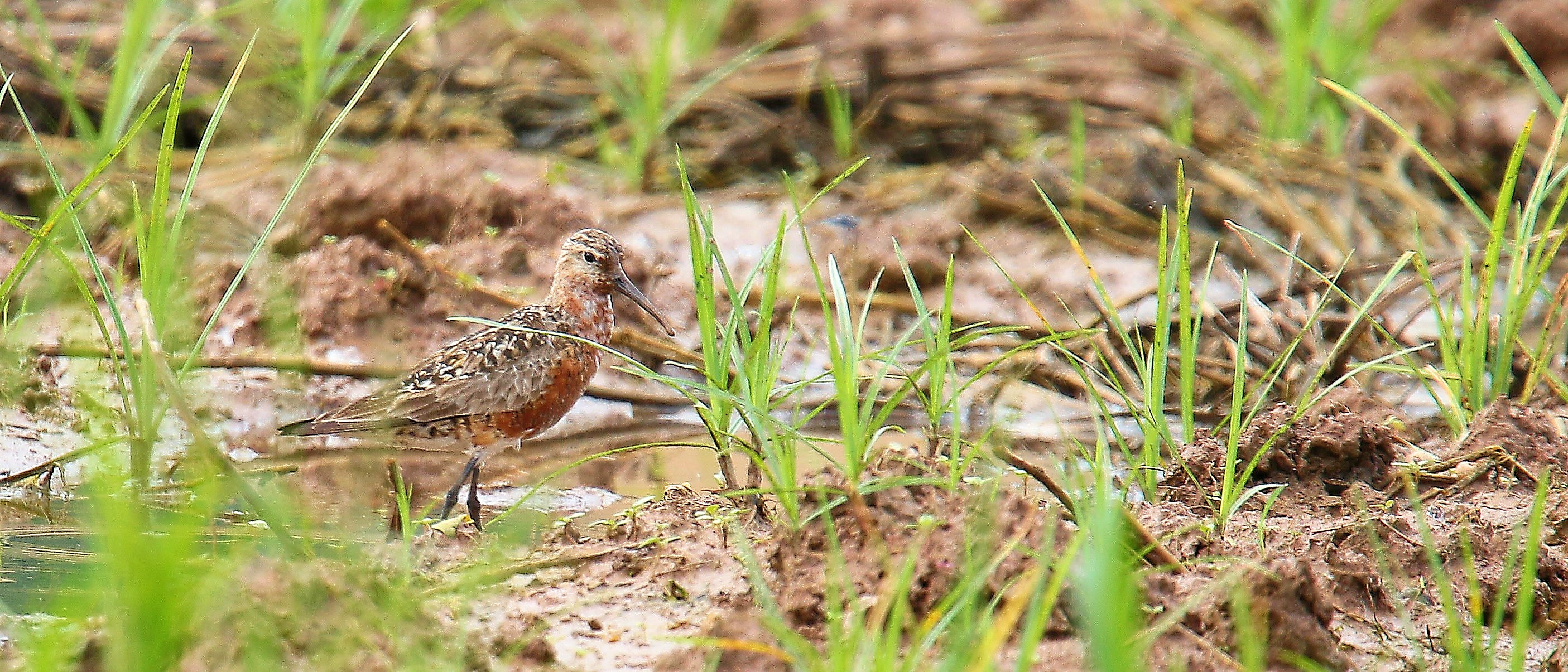 Rẽ bụng nâu được chụp tại Hà Nội